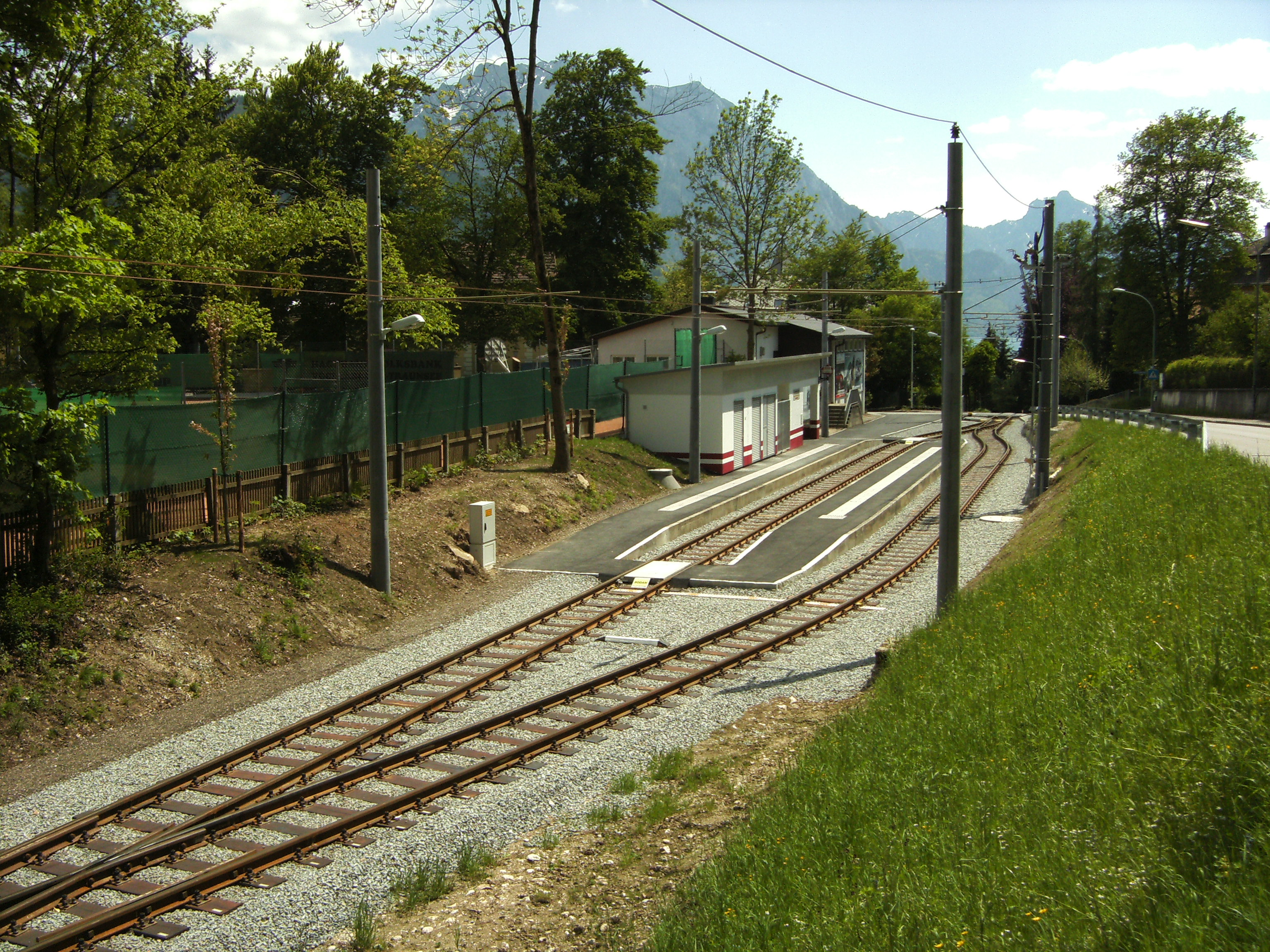 Haltestelle Tennisplatz der Gmundner Straßenbahn